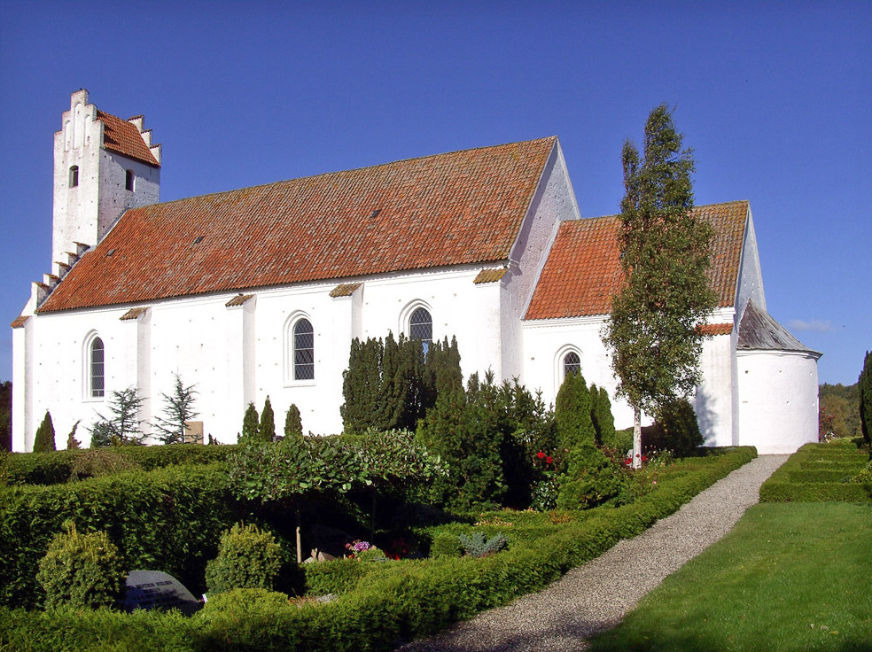 fra syd